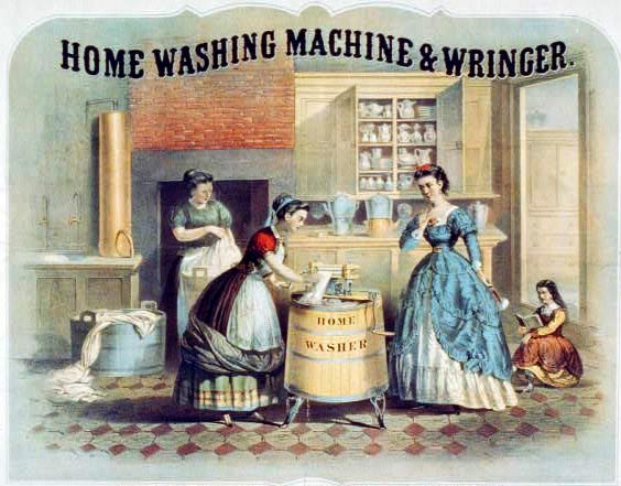 Home Washing Machine and Wringer